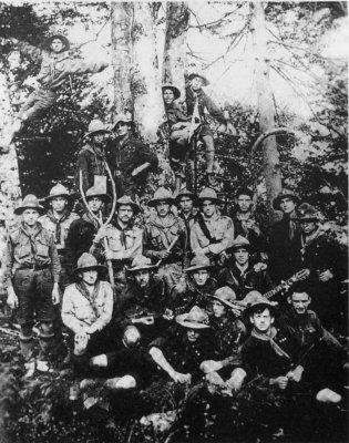 Пластовий табір насхилах гори Сокіл в Карпатах, літо 1926 року. "Лісові Чорти", організатори табору на своїй Великій Племінній Раді 1 ряд: Андрій Охрімович, Володимир Мурський, Юрій П’ясецький; 2 ряд: Тарас Грушкевич, Юліан Воробкевич, Роман Шухевич, Ярко Веселовський, Юрій Студинський, Богдан Стернюк, Юрій Цегельський, Марко Бачинський, Юрій Старосольський; 3 ряд: Іван Губенко, Петро Пясецький, Мирослав Чаковський, Роман Барановський; вгорі, на деревах: ?, Степан Щуровський, Степан Коржинський, Роман Мацюрак, Богдан Кравців, Василь Кархут.